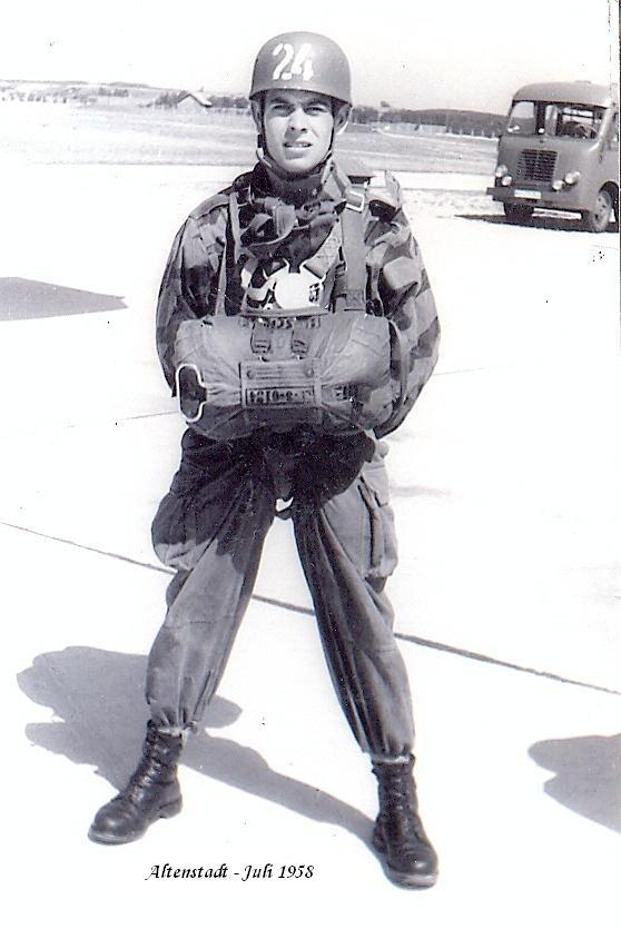 Hunter - an infantryman in the airborne troops - full equipment - reserve parachute T7A - T10 main parachute covered